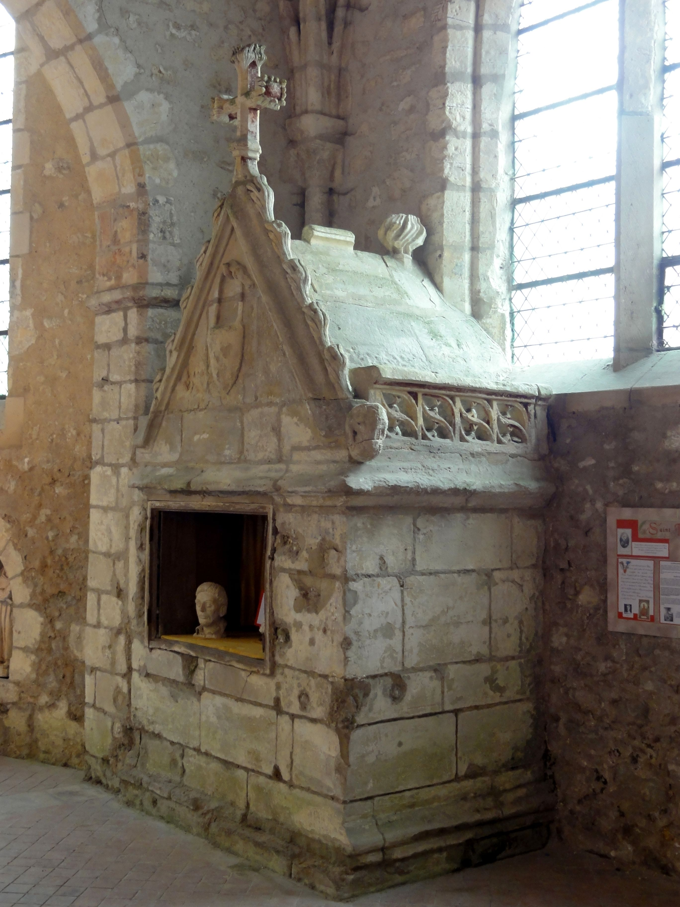 Reliquaire dans le croisillon sud.